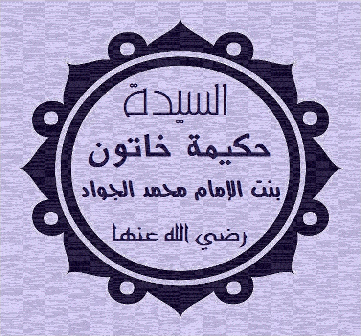 تخطيط اسم السيدة حكيمة خاتون بنت الإمام محمد الجواد